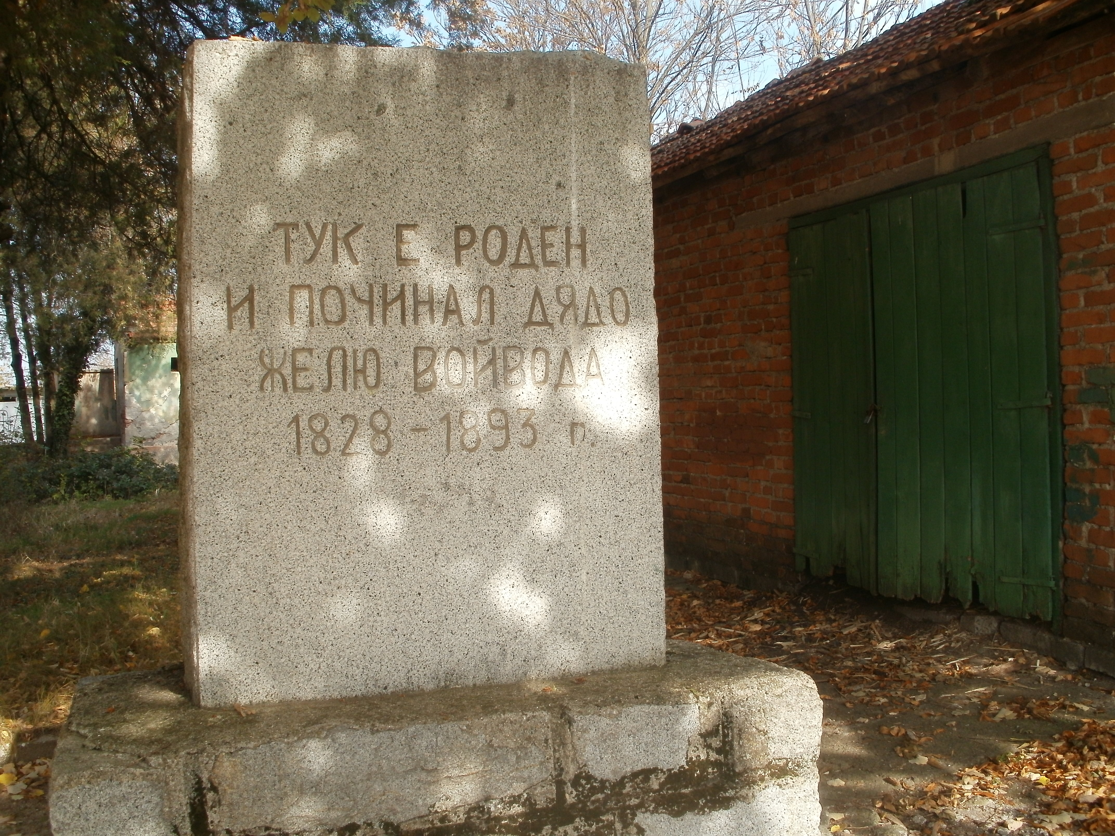 Паметна плоча на Желю войвода намираща се в с.Маломир, област Ямбол.